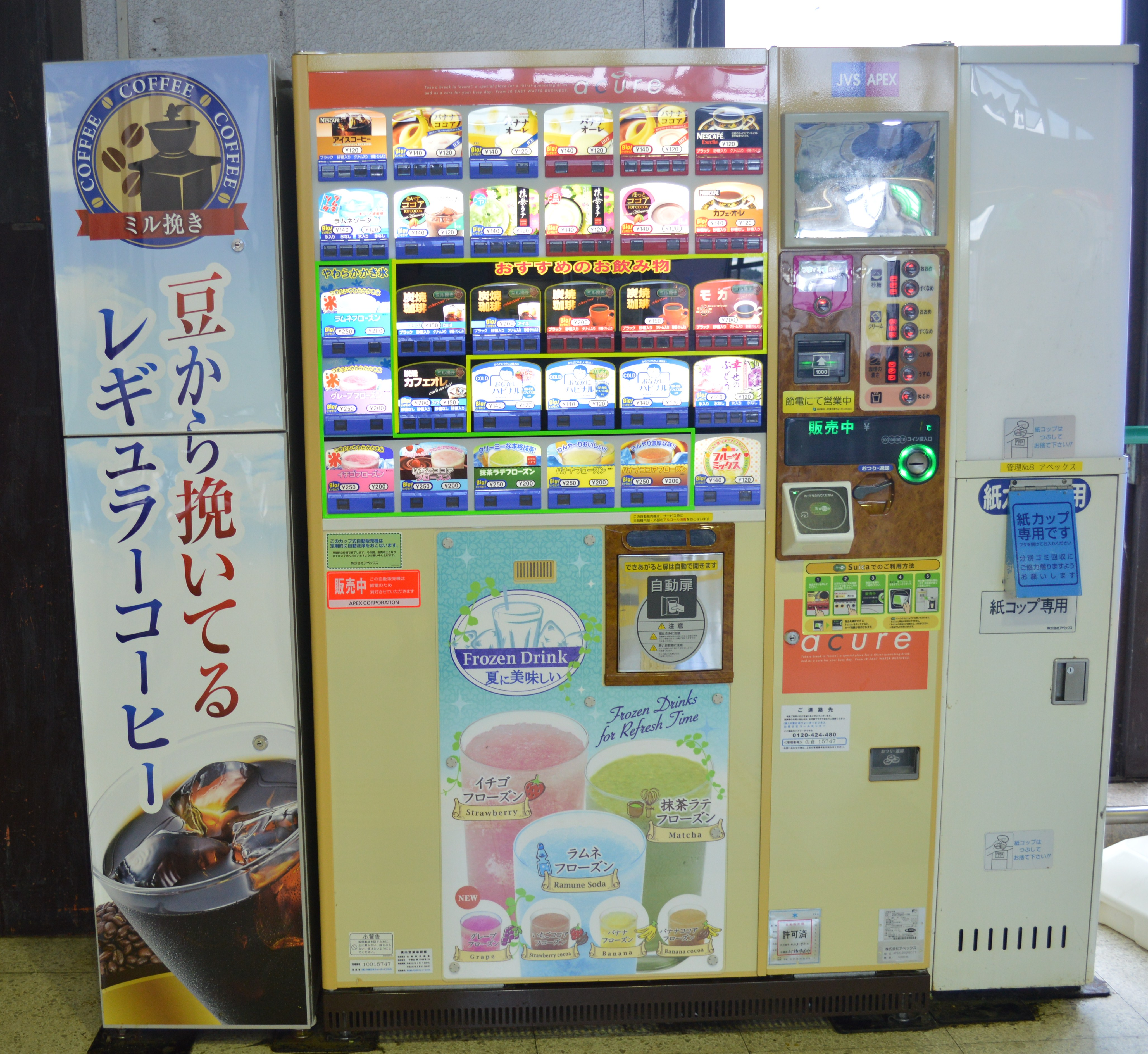 アペックスの飲料用自動販売機